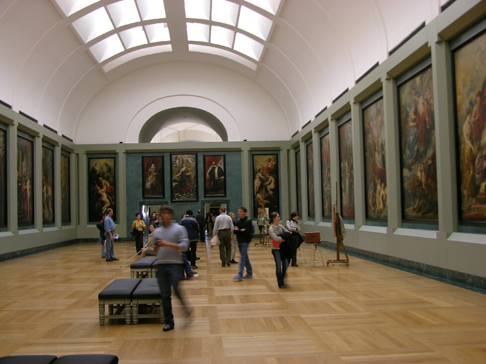 Rubens-Saal Louvre Museum (Inventory)Native nameMusée du LouvreParent institutionÉtablissement public du musée du LouvreLocationParisCoordinates48° 51′ 37.42″ N, 2° 20′ 15.36″ E Established1793Web page control : Q19675 VIAF: 257711507 ISNI: 0000 0001 2260 177X ULAN: 500125189 LCCN: n80020283 NLA: 35912436 WorldCat institution QS:P195,Q19675